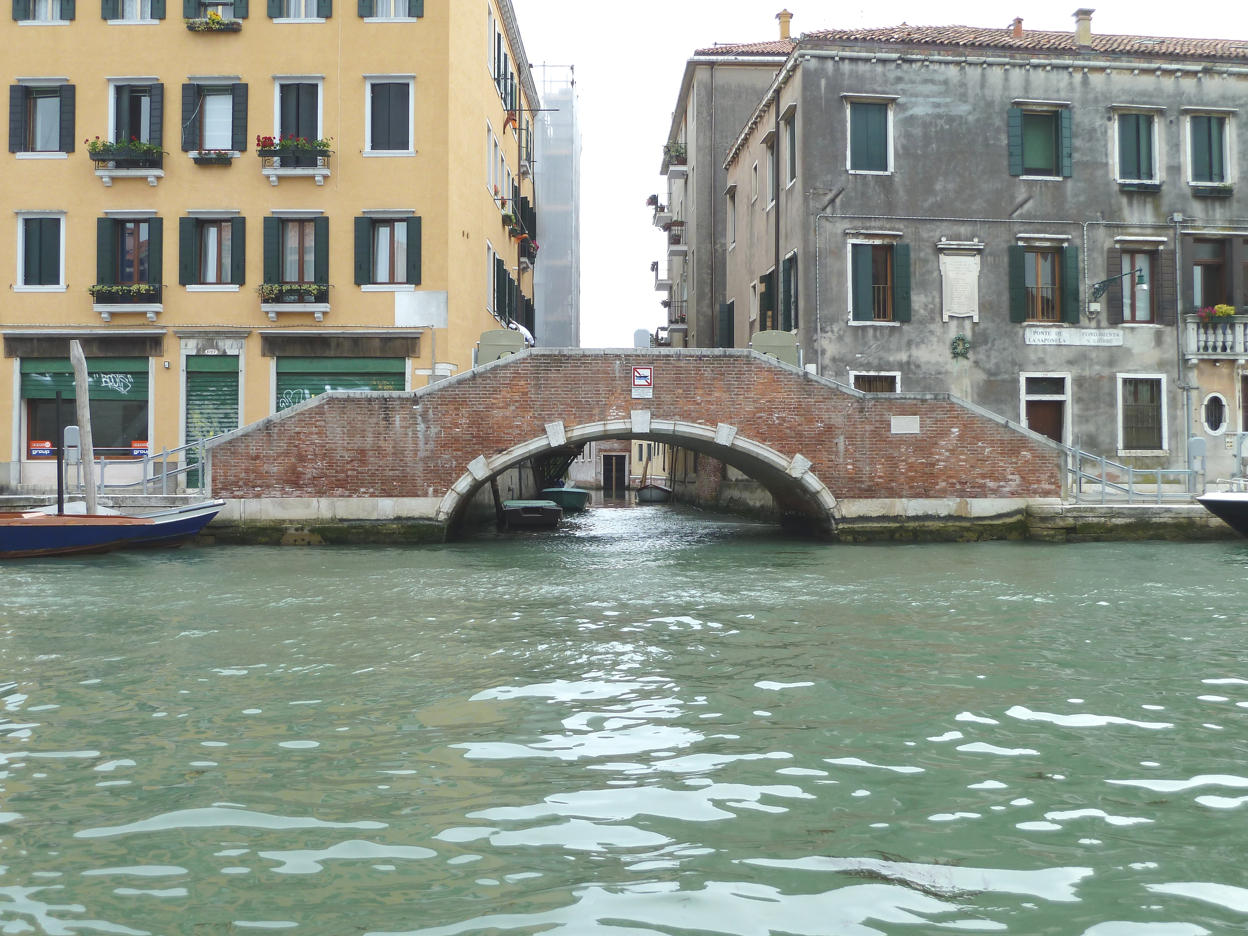 Ponte de la Saponella (Venice)